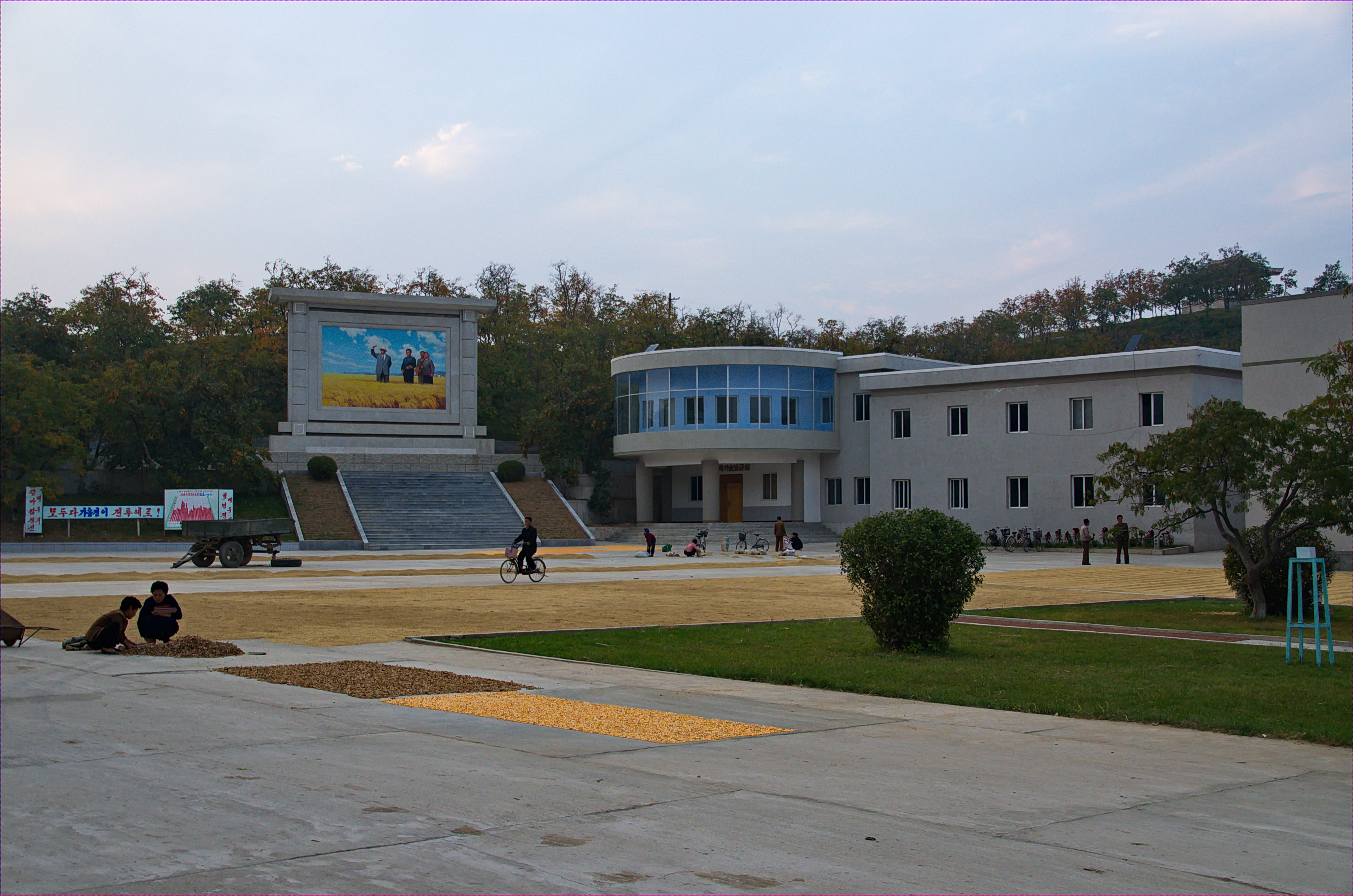 Nordkorea 2015 - landwirtschaftliche Kooperative Chonsam